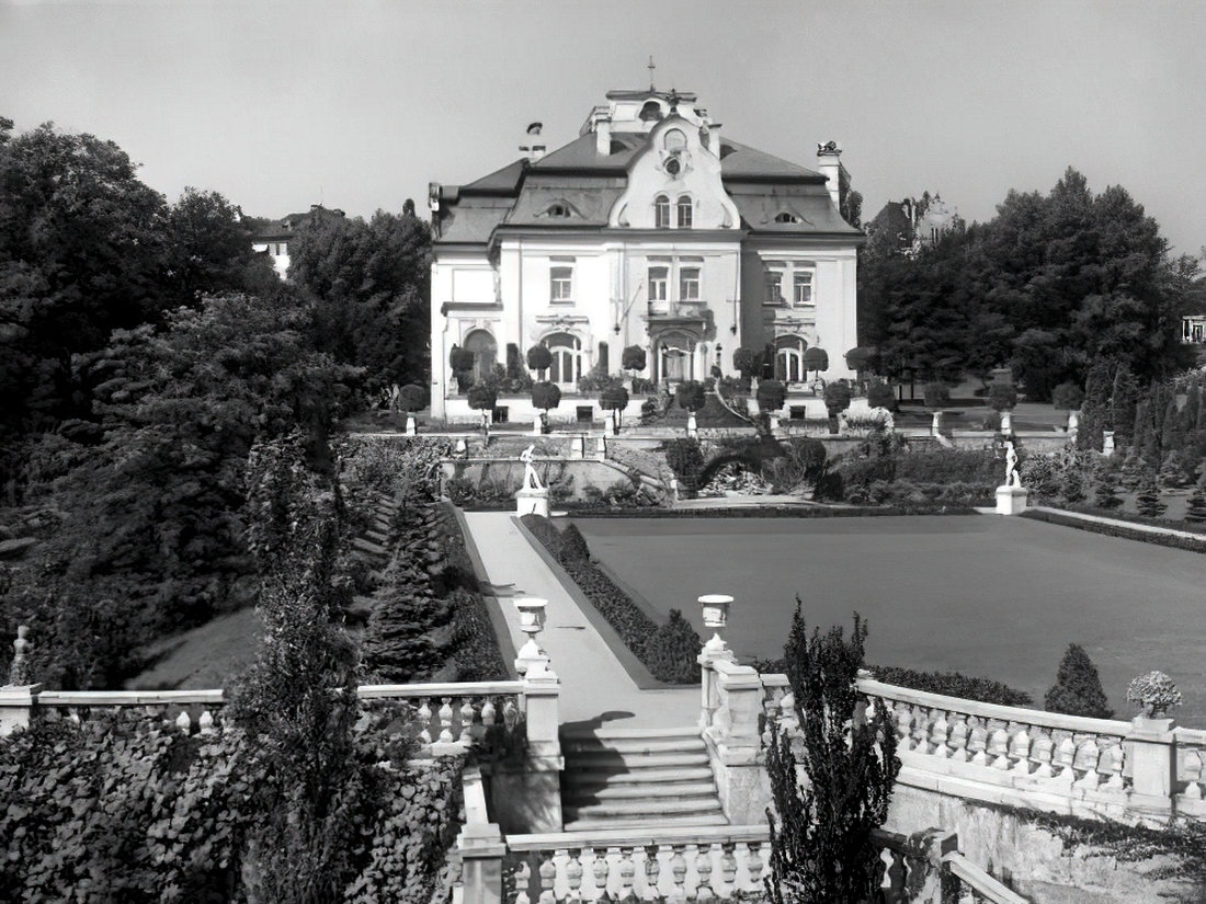 Linz, ehemalige Hatschekvilla am Bauernberg, Auf der Gugl